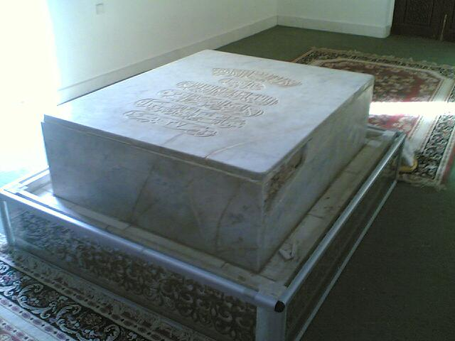 ضريح مالك الاشتر من الداخل